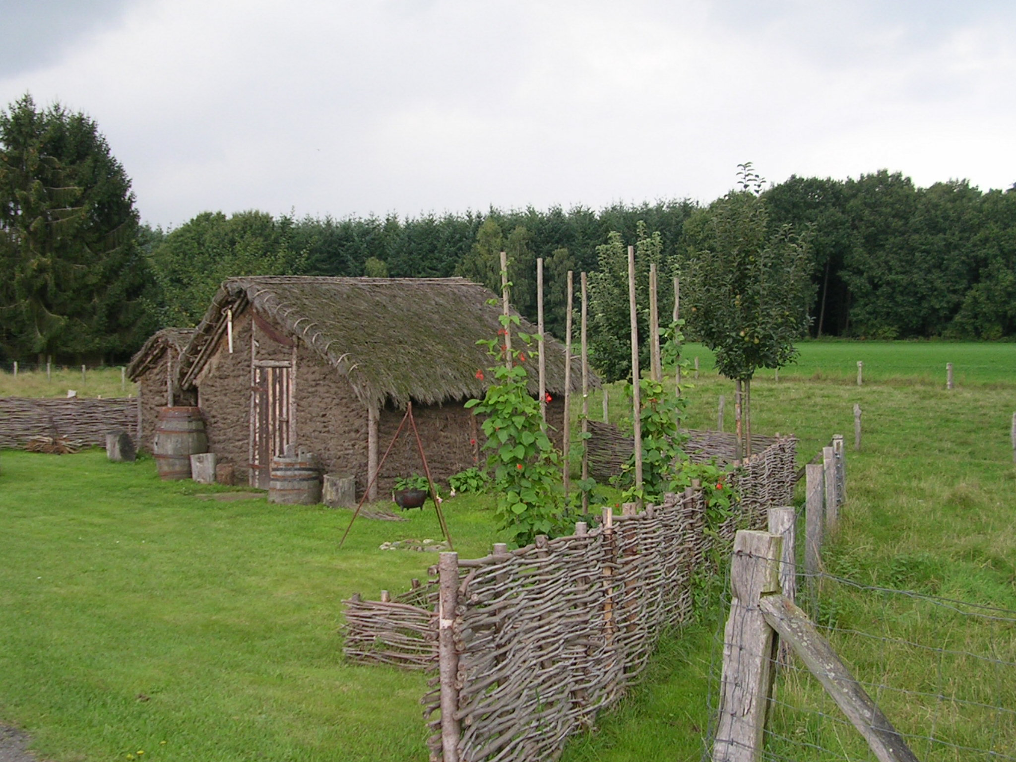 Alpen-Bönninghardt (Nordrhein-Westfalen, Deutschland): Nachbau einer Plaggenhütte